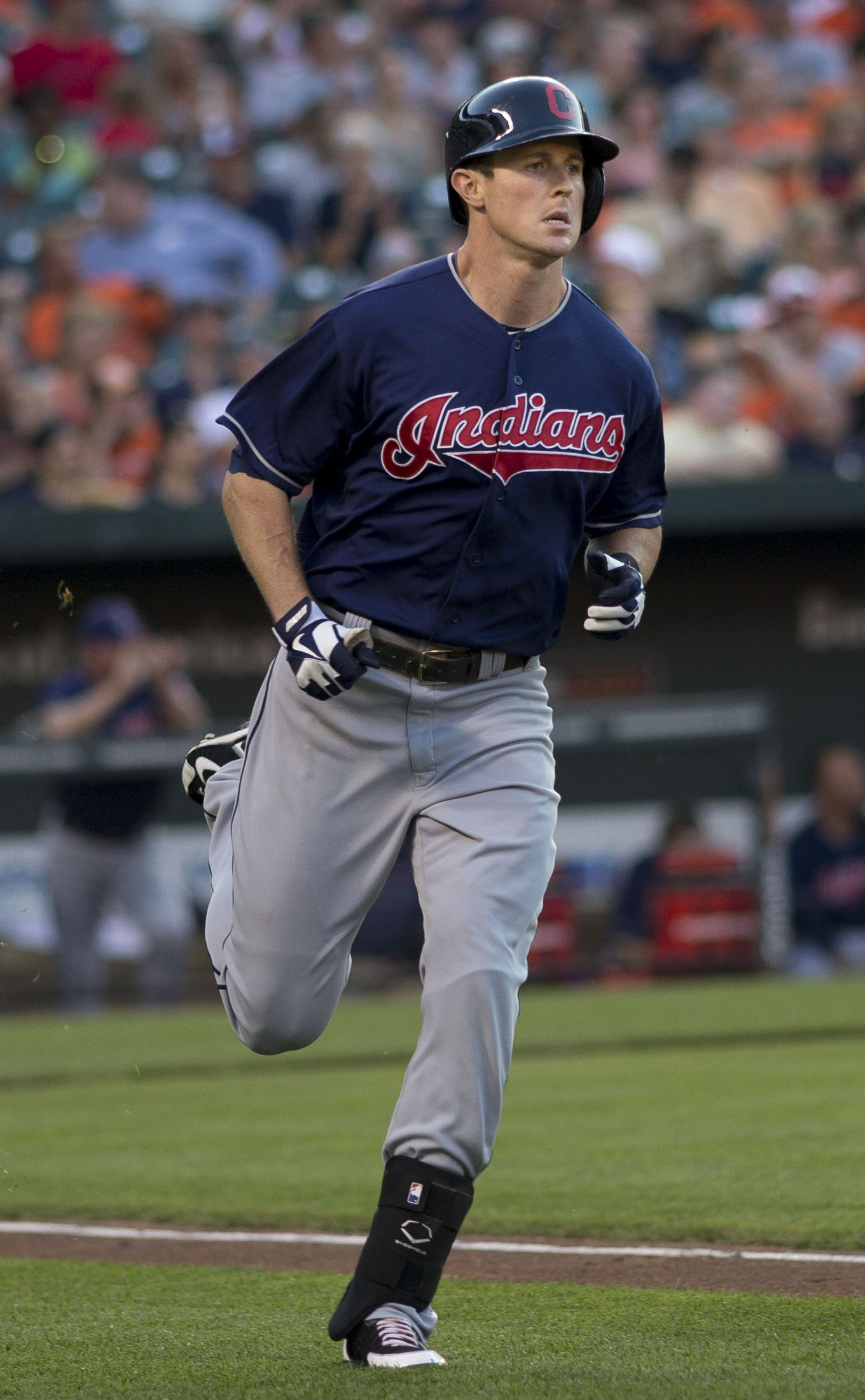 Drew Stubbs